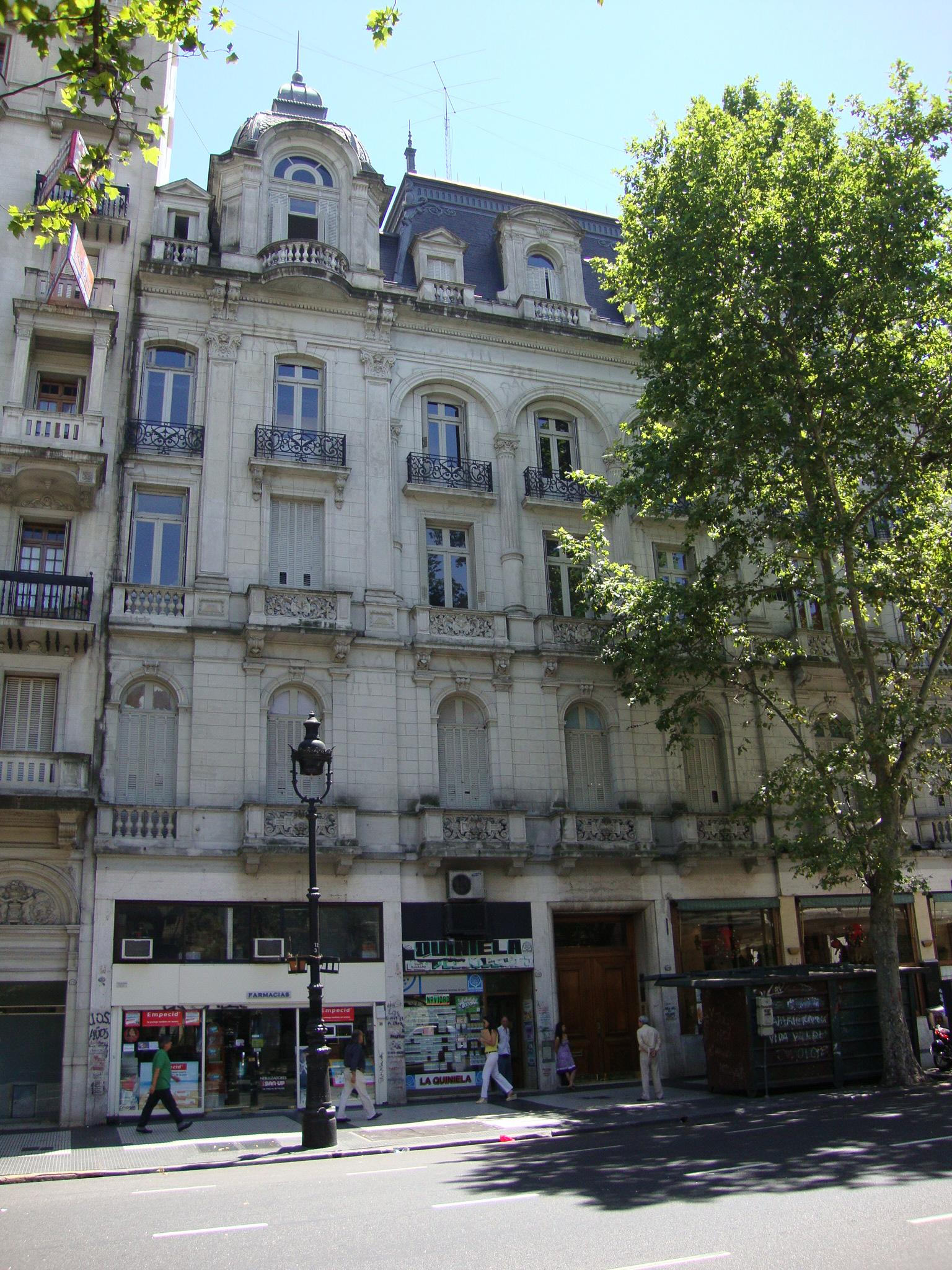 Ex Hotel París, Avenida de Mayo nº 1209.